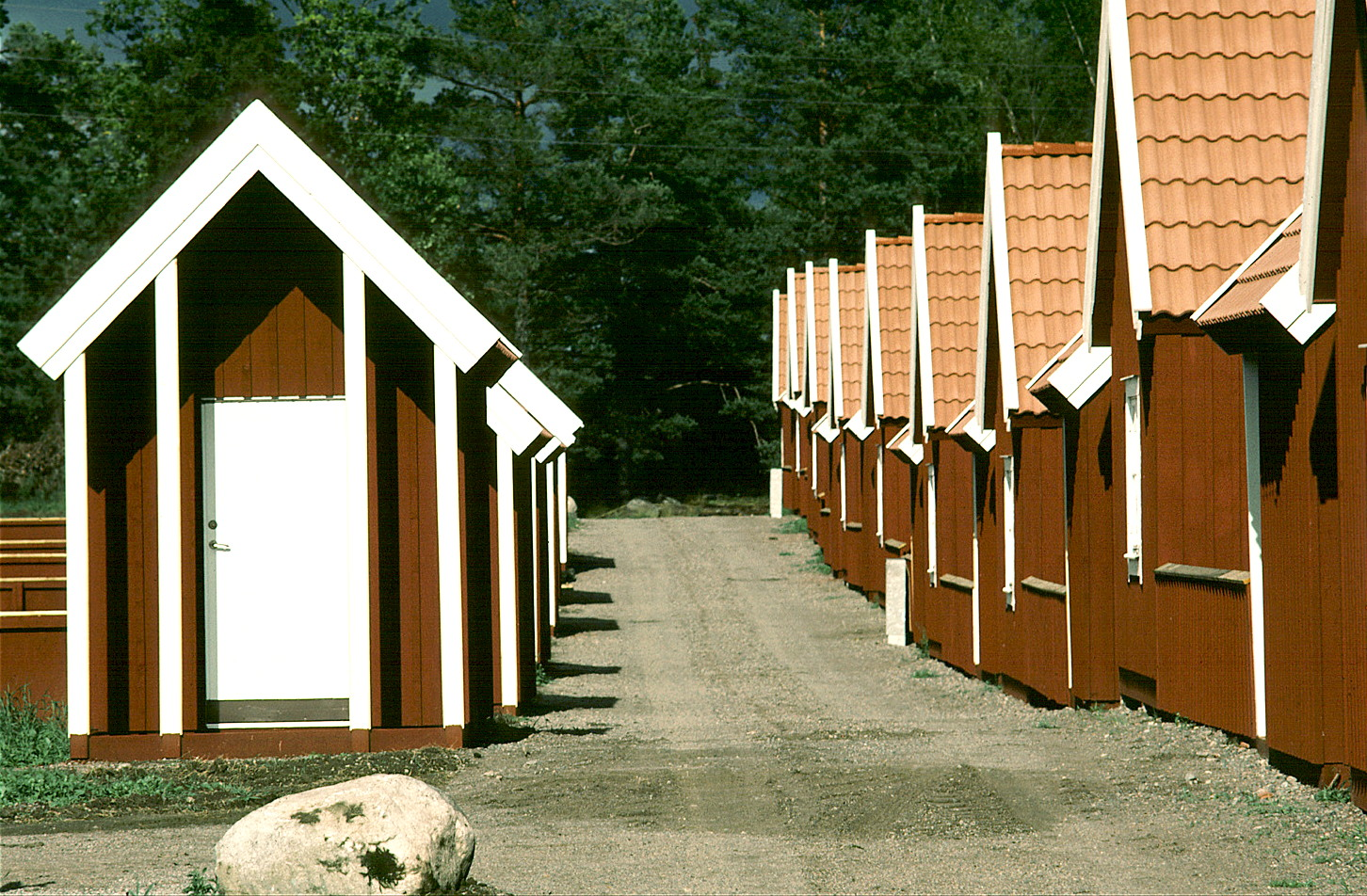 Hulthstugor på Värmdö, Hjortens Odling vid Malma Kvarn